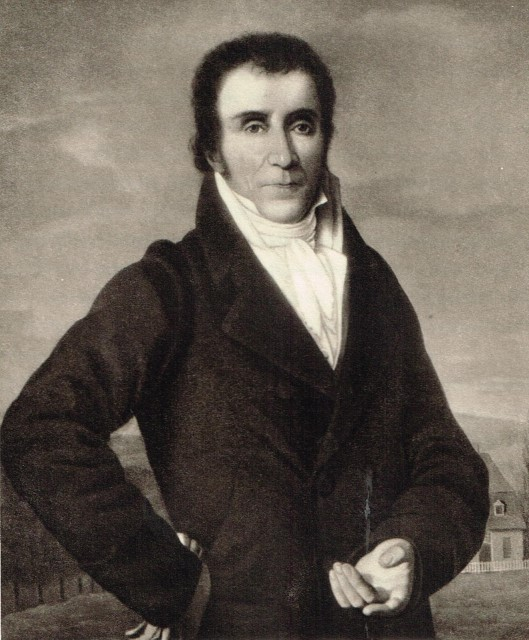 Scan (22.11.2019)